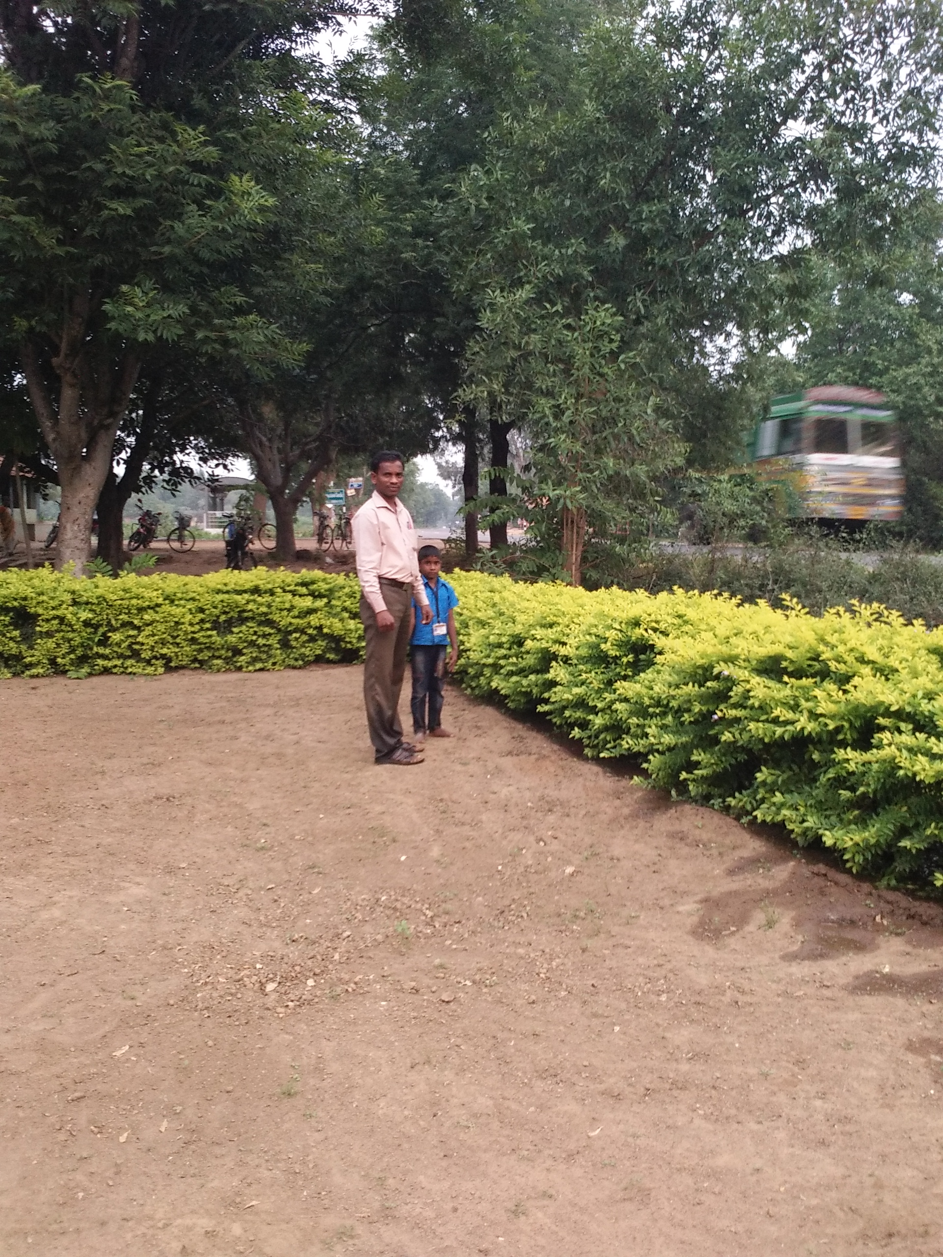 ஊ.ஒ.தொ. பள்ளி கோவில்பட்டி